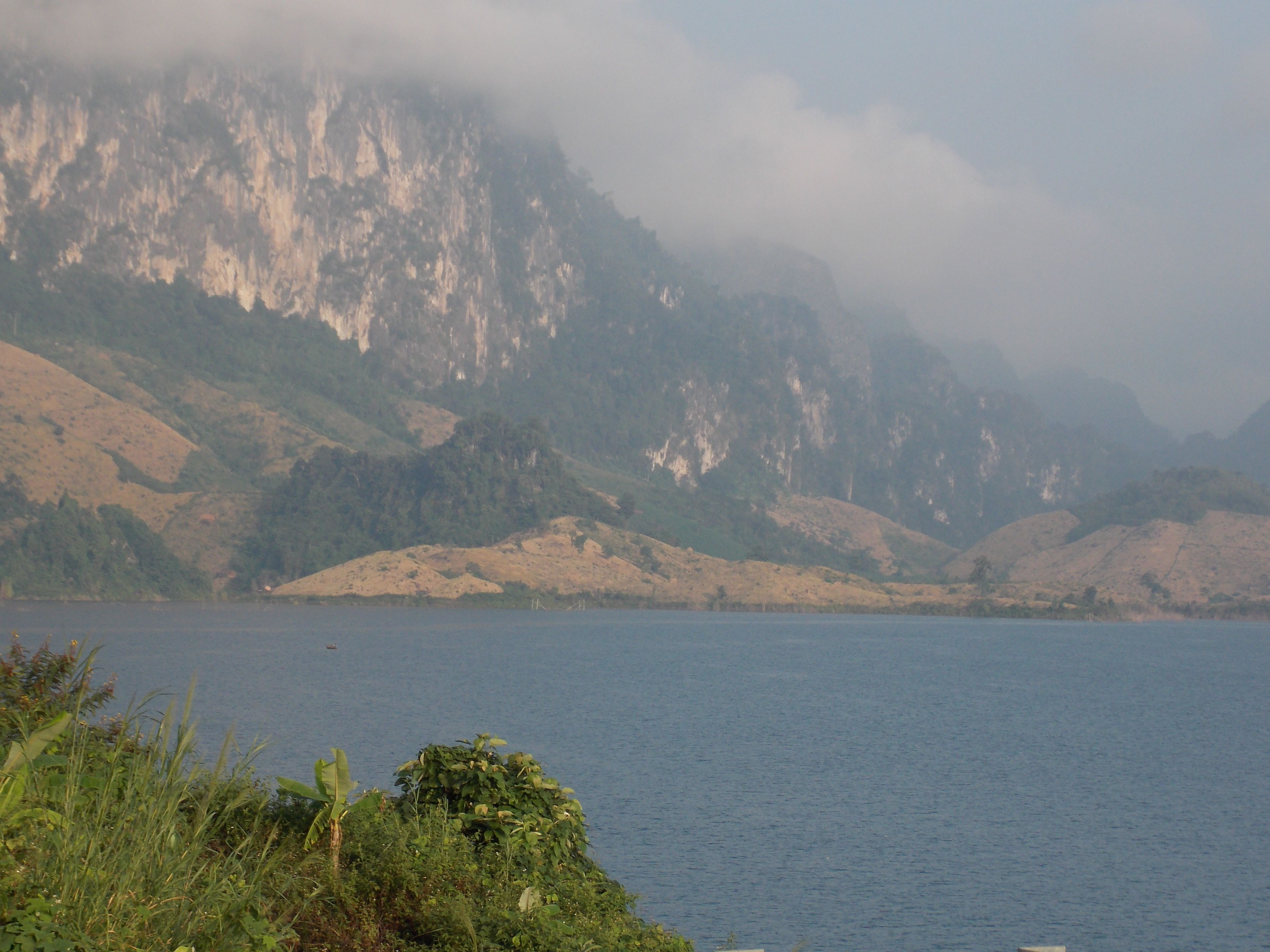 Chiềng Ơn, Quỳnh Nhai, Sơn La, Vietnam